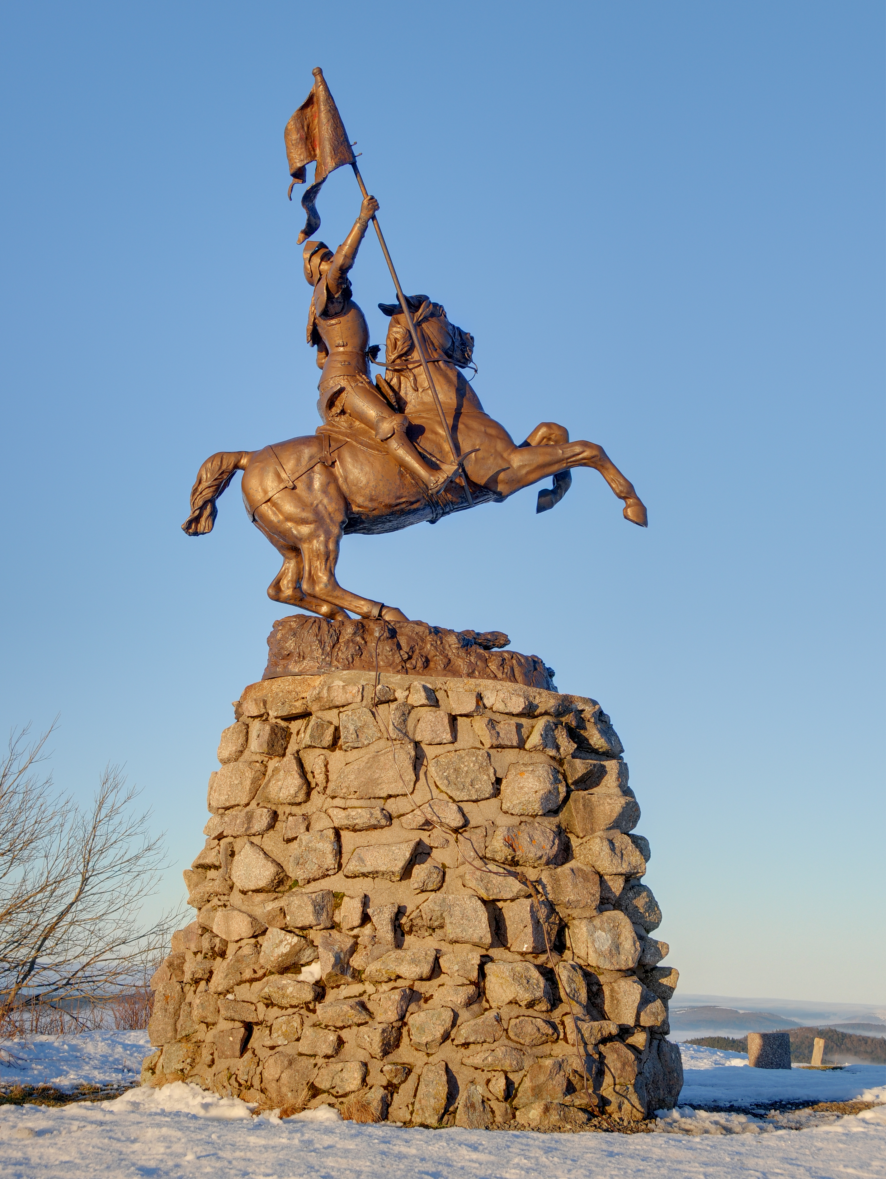 This photograph was taken with a Nikon D300 Statue de Jeanne d'Arc au sommet du ballon d'Alsace (HDR), sur la commune de Saint-Maurice-sur-Moselle.